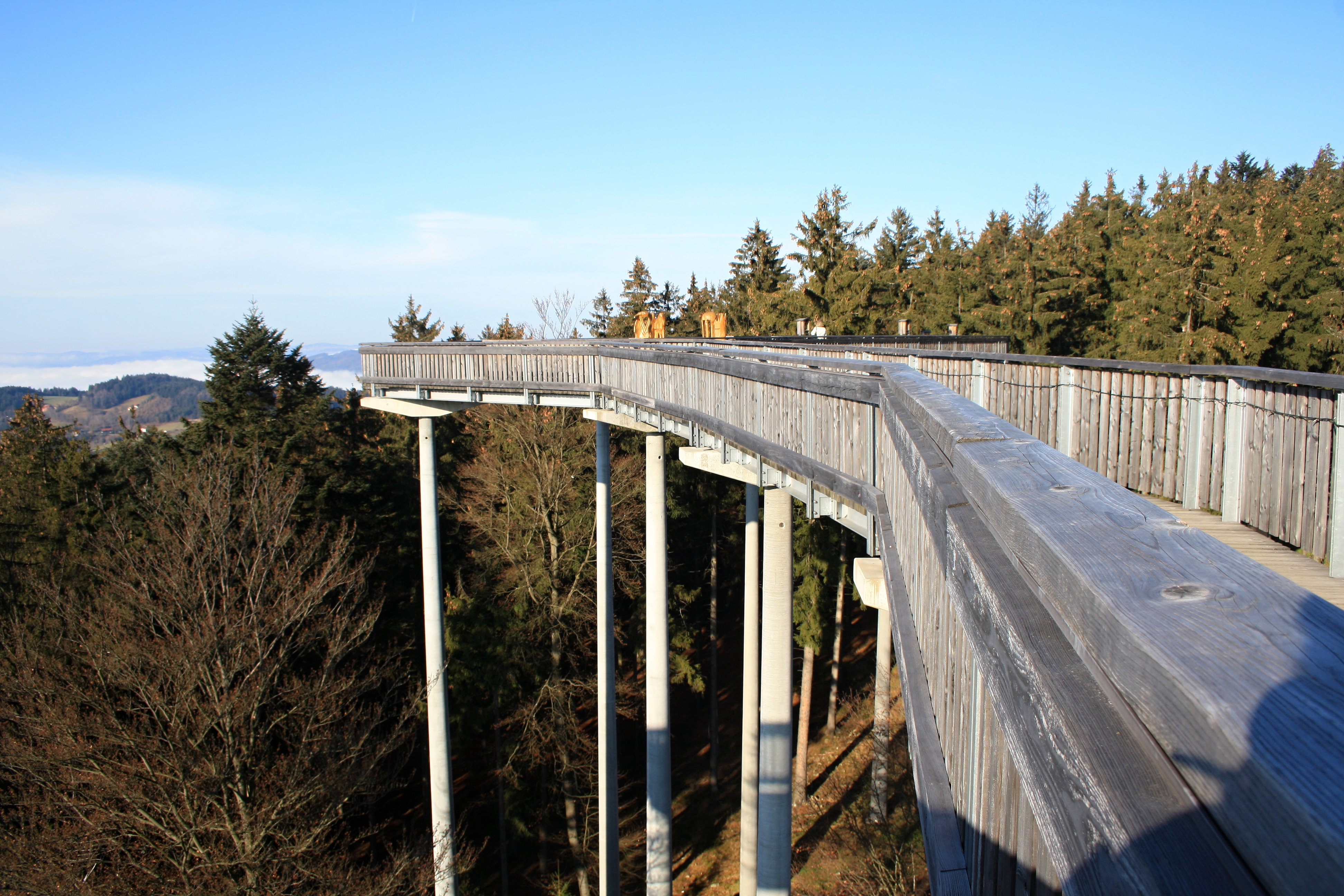 Von der Aussichtsplattform beim Wald-Wipfel-Weg (in 94379 Sankt Englmar, Naturpark Bayerischer Wald) sieht man bei schönem Wetter bis zu den Alpen. Nahe Blickpunkte sind Niederbayern, Donauregion mit Straubing, Bogenberg mit Wallfahrtskirche …